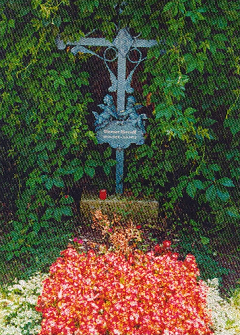 Friedhof Bogenhausen-Werner Kreindl